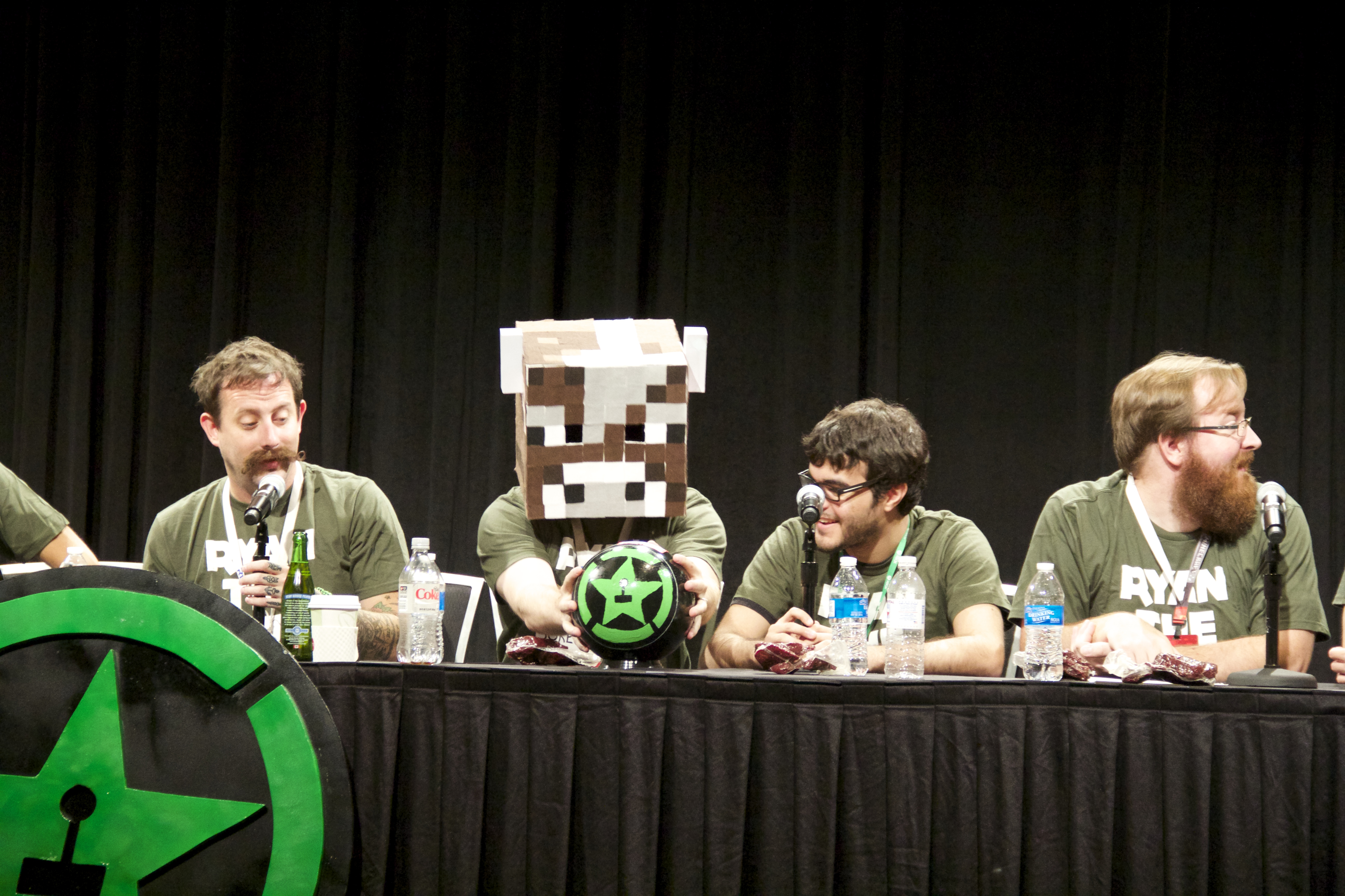 IMG_1957 Taken at RTX 2014.